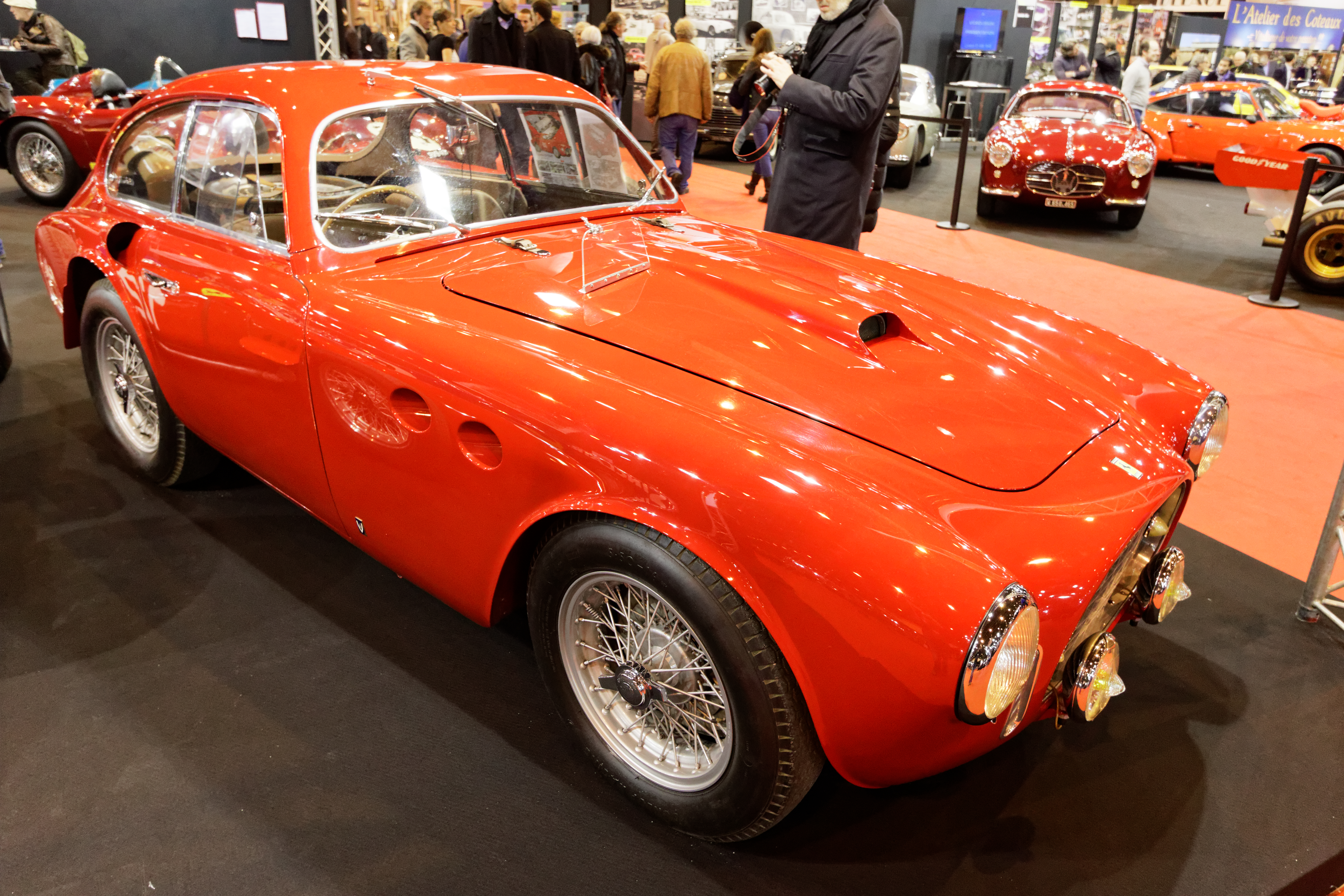 Une Ferrari 250 Sport de 1952 exposée lors du salon Rétromobile 2016.